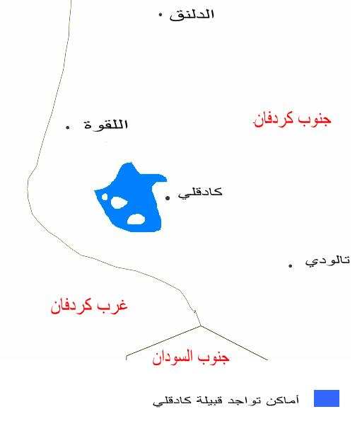 أماكن تواجد قبيلة كادقلي